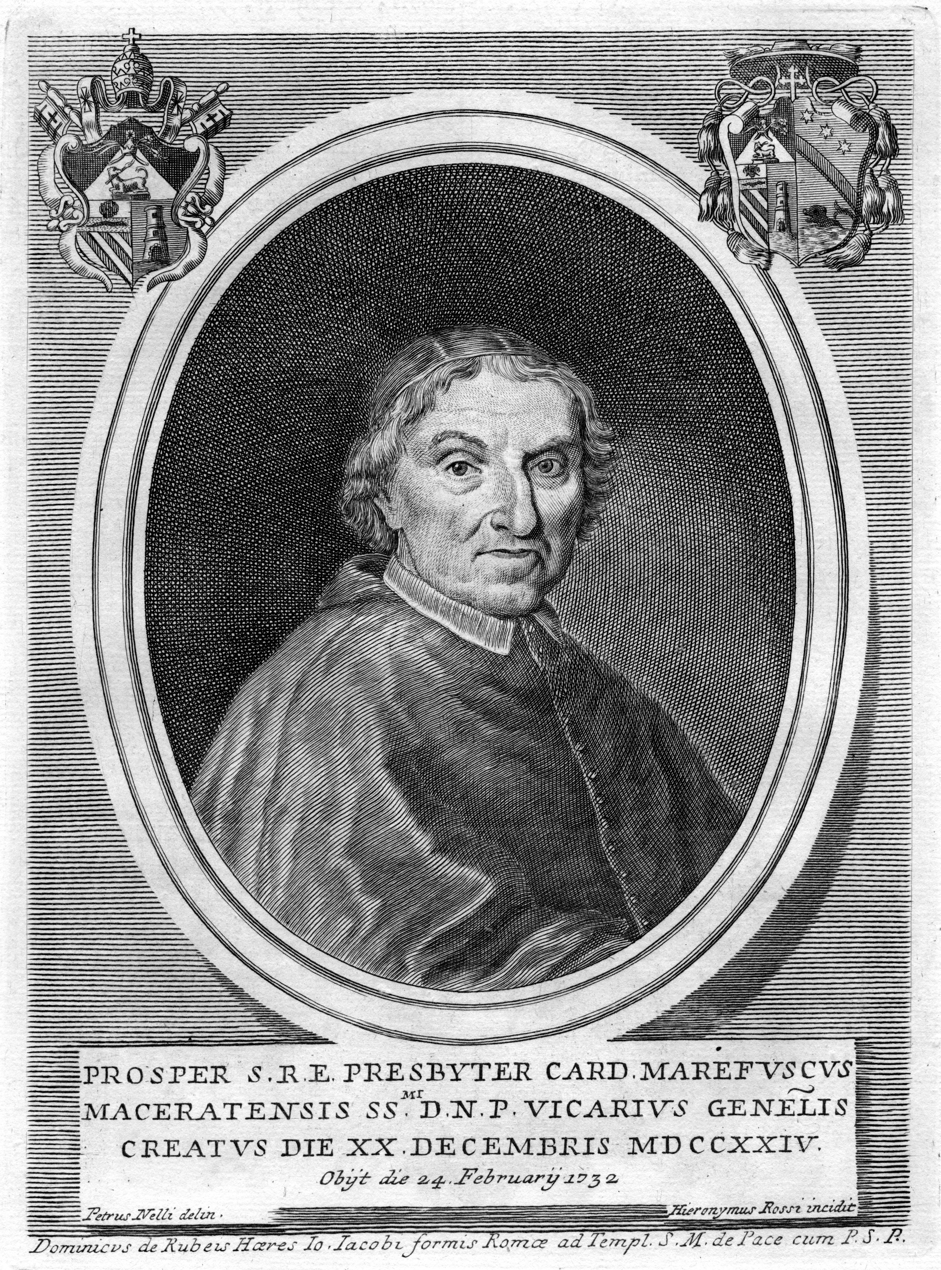 Portrait de Prospero Marefoschi (1653-1732)